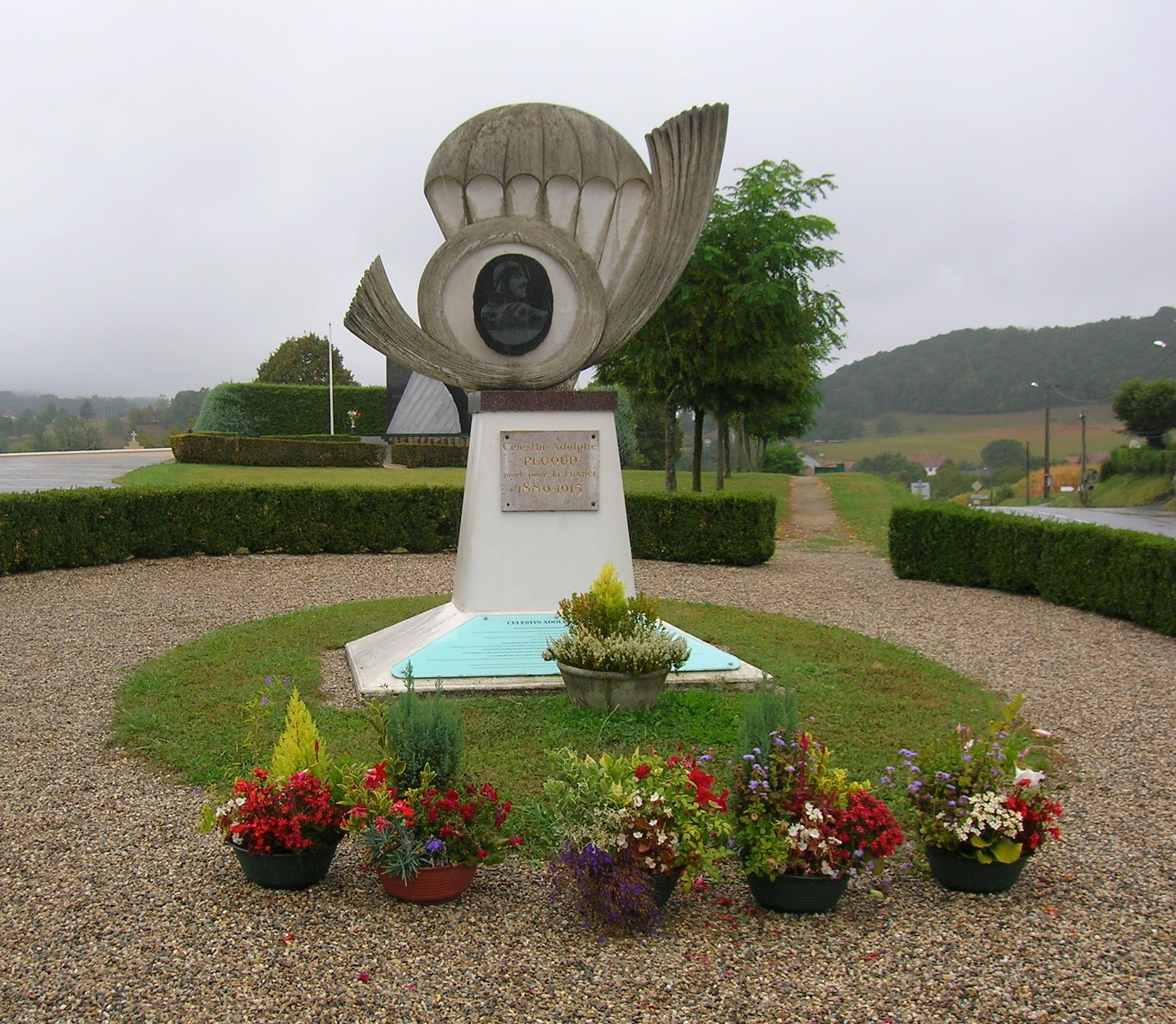 Stèle à la mémoire de Pegoud. Journées du patrimoine 2016. Montferrat, Isère, AuRA, France.